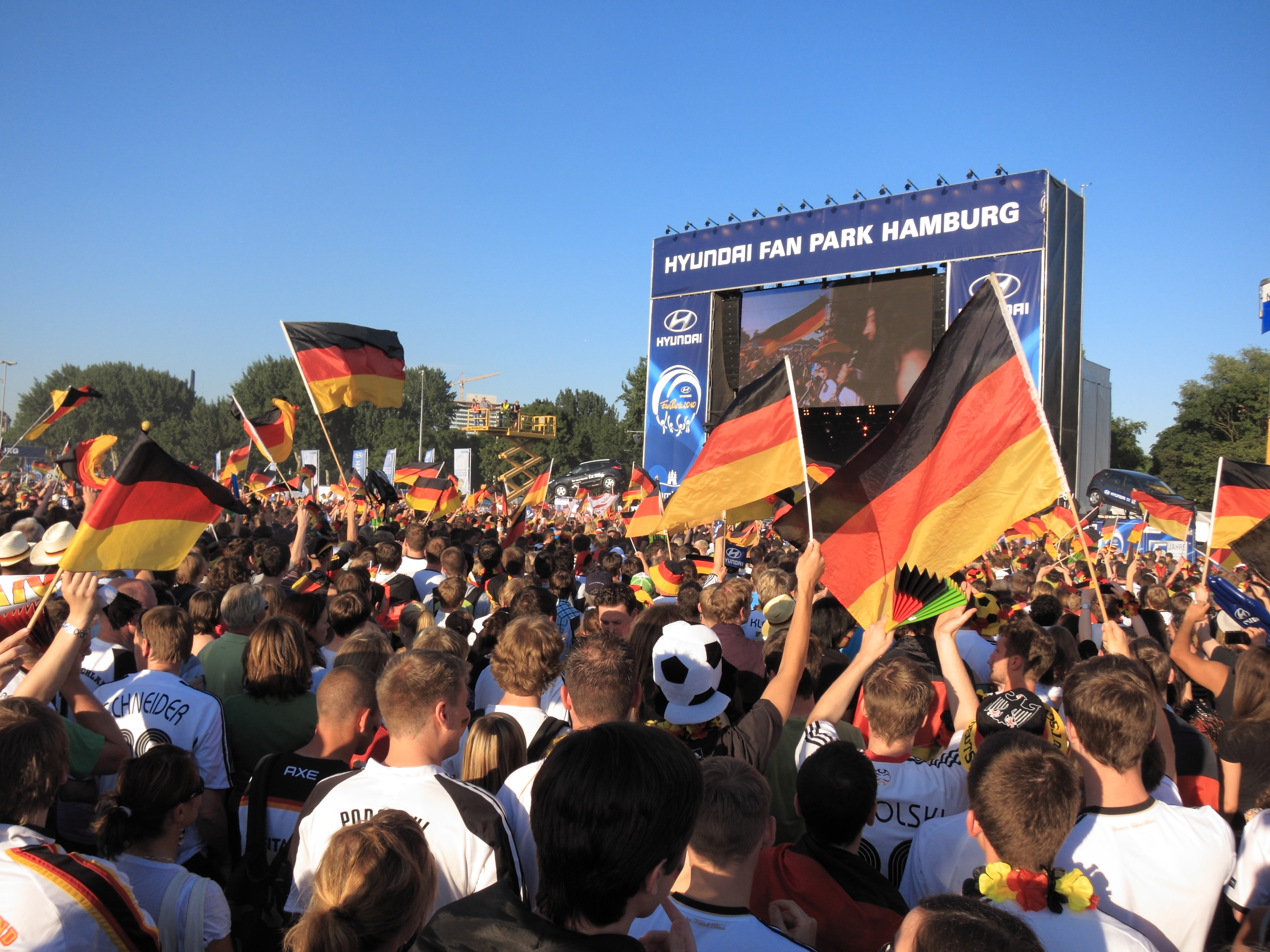 Uwu Lena im Fan Park Hamburg